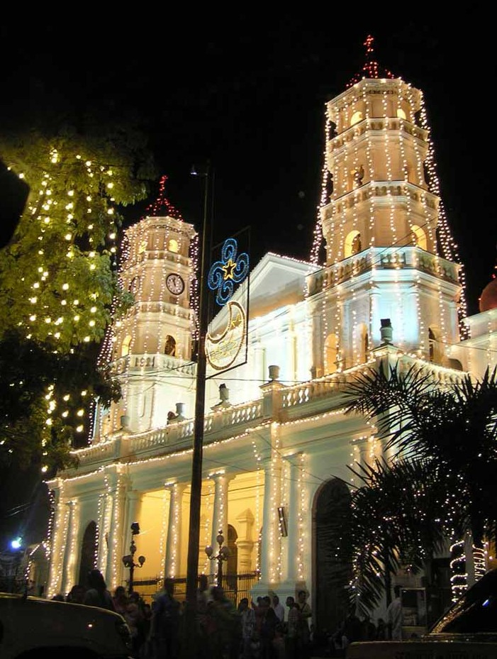 Iglesia de Santa Gertrudis. Envigado, Colombia.